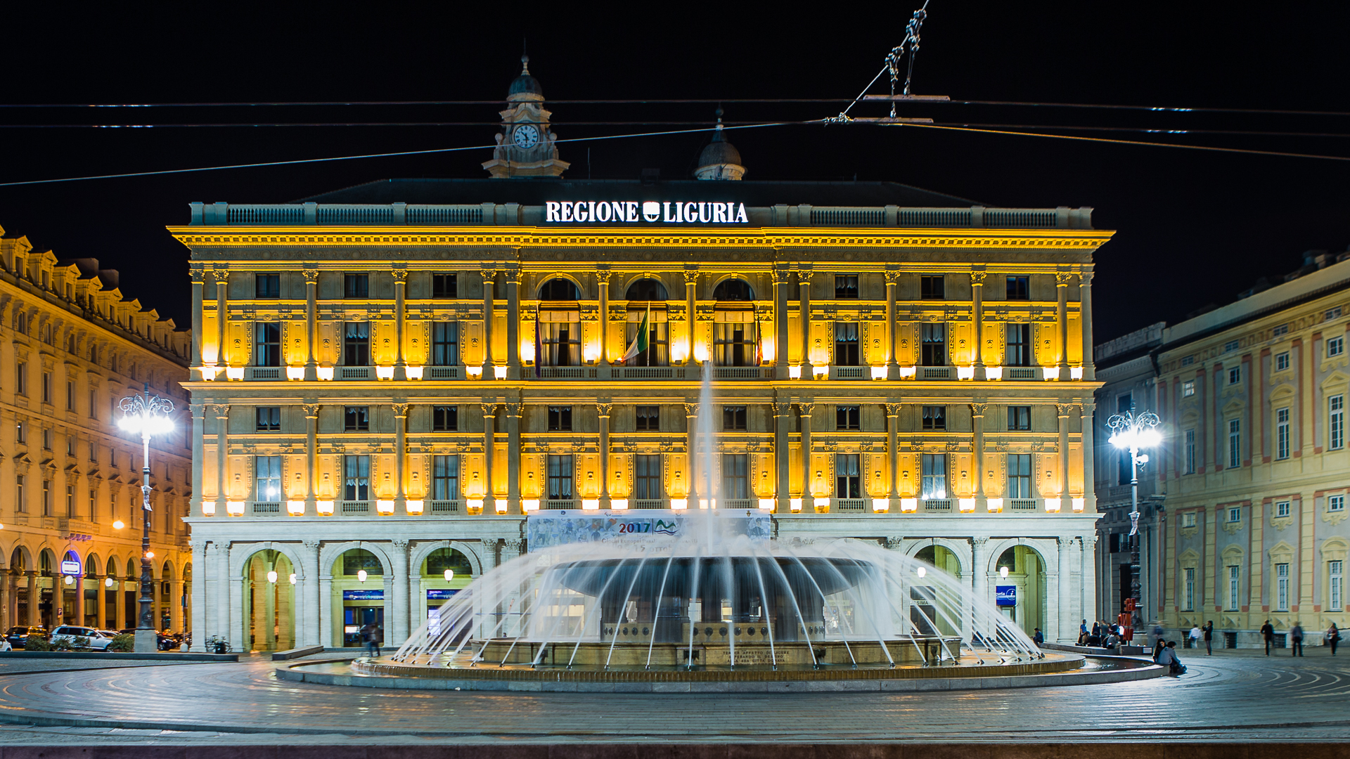 fontana di piazza De Ferrari This is a photo of a monument which is part of cultural heritage of Italy.